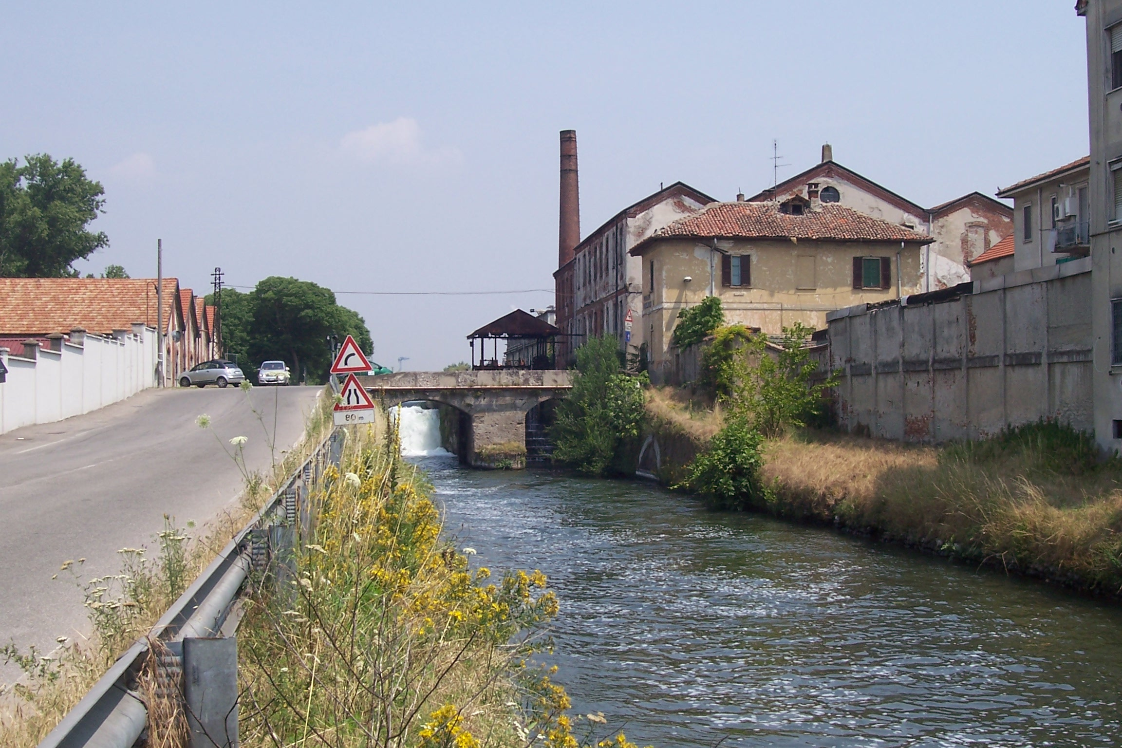 Rozzano, la Conca della Filanda da Valle